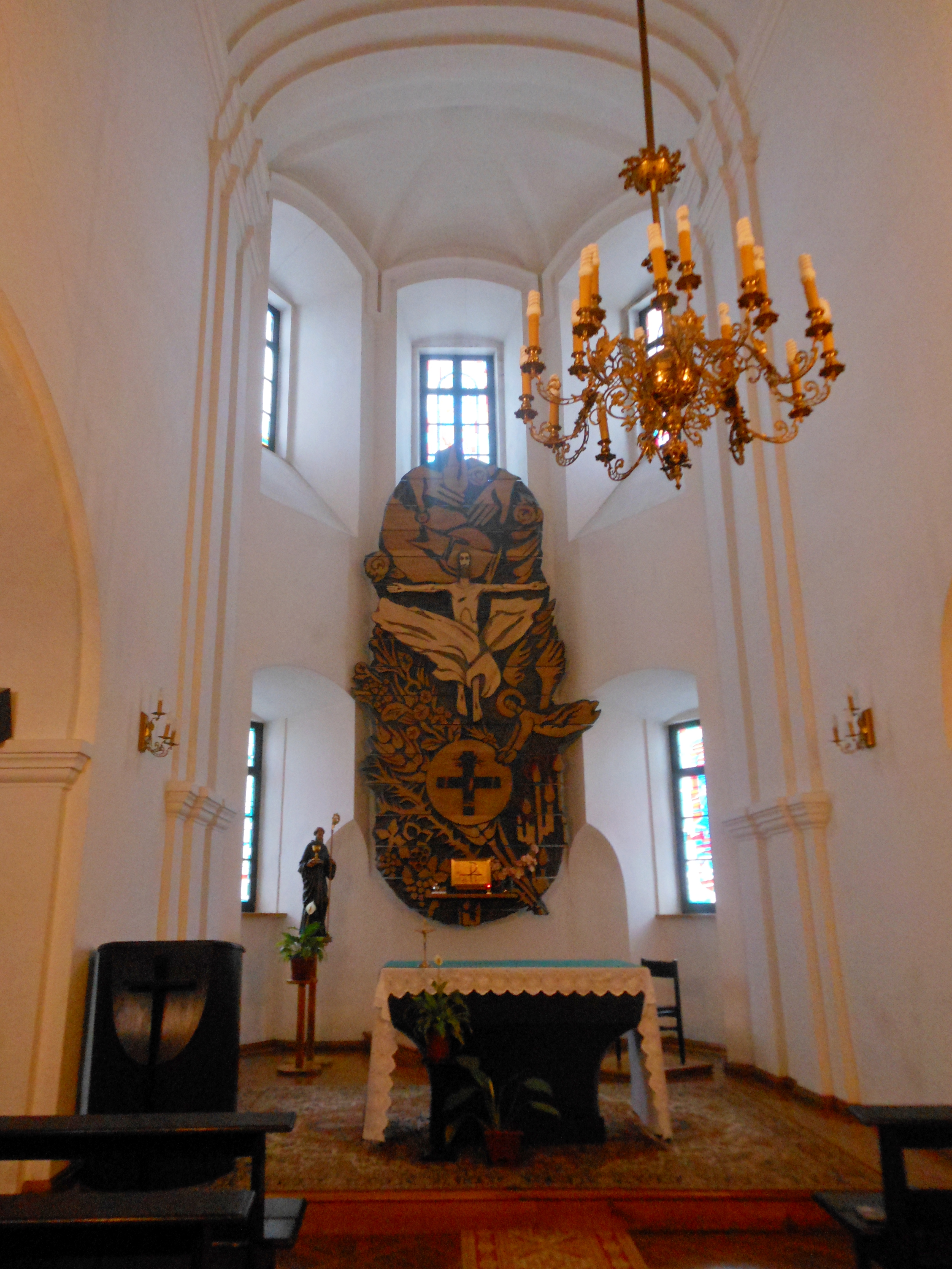 Покровська церква з келіями (Кармелітський монастир), Бар (місто), вул. Монастирська,55